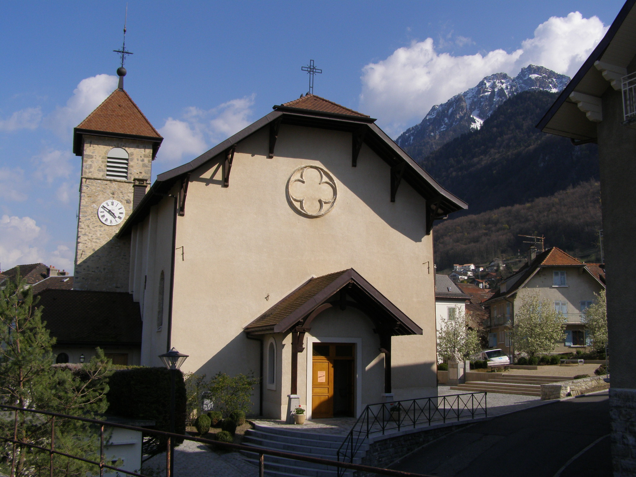 Eglise St-Laurent de St-Gingolph. Vue prise depuis la ligne de chemin de fer